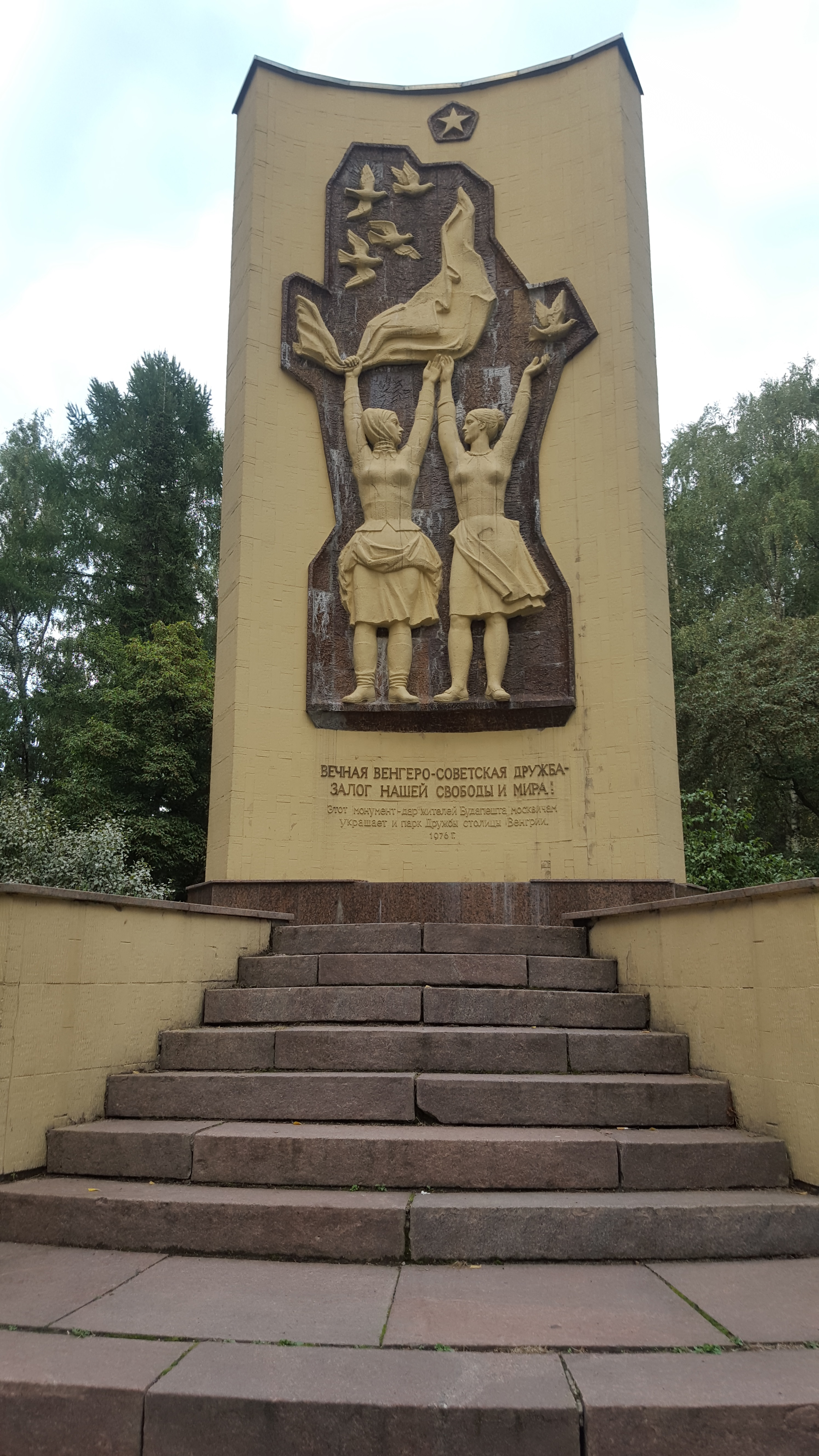 Парк Дружбы. Произведения монументальной скульптуры:: Ленинградское шоссе, на территории "Парка Дружбы", Левобережный, Северный округ, Москва